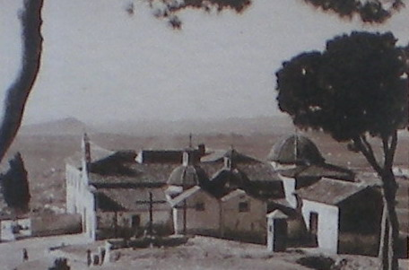 Ermita de las cruces, principios siglo XX